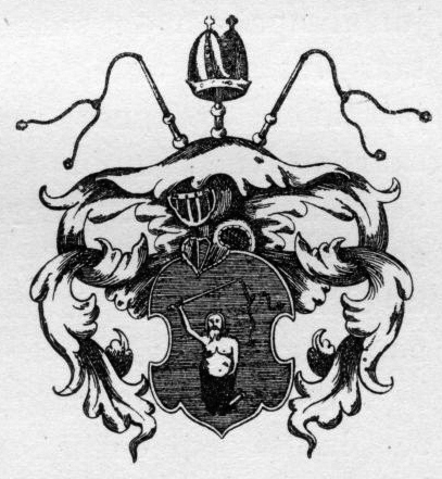 vaakunakilpi